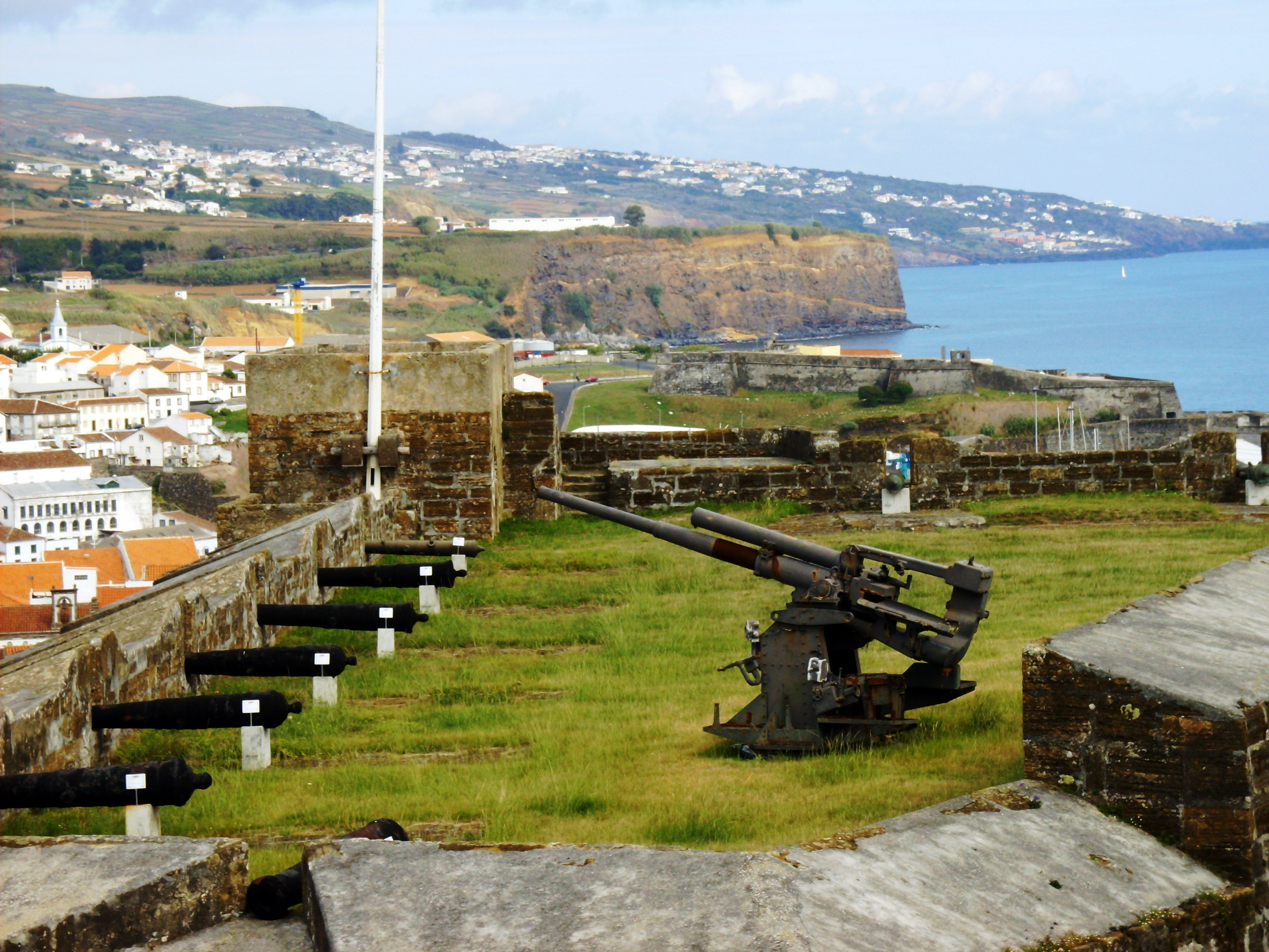 Fortaleza de São Sebastião do Monte Brasil, Angra do Heroísmo, ilha Terceira, Açores: núcleo museológico de armaria, sob responsabilidade do Museu de Angra do Heroísmo. Em primeiro plano um canhão antiáereo QF 3.7 polegadas AA, de fabricação britânica.